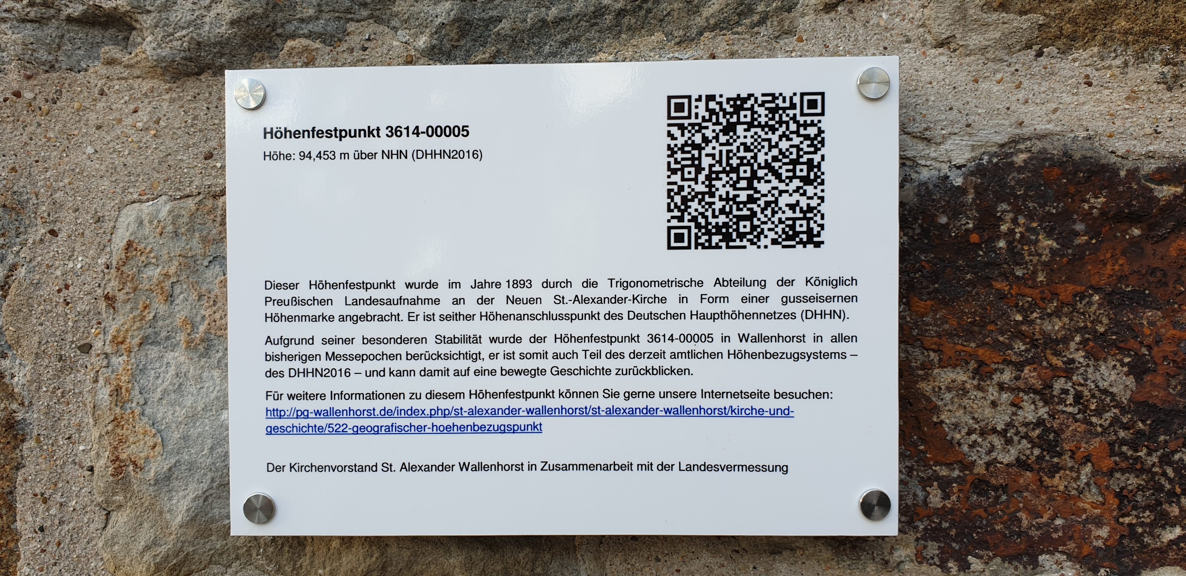 Info Tafel Höhenfestpunkt St. Alexander Wallenhorst